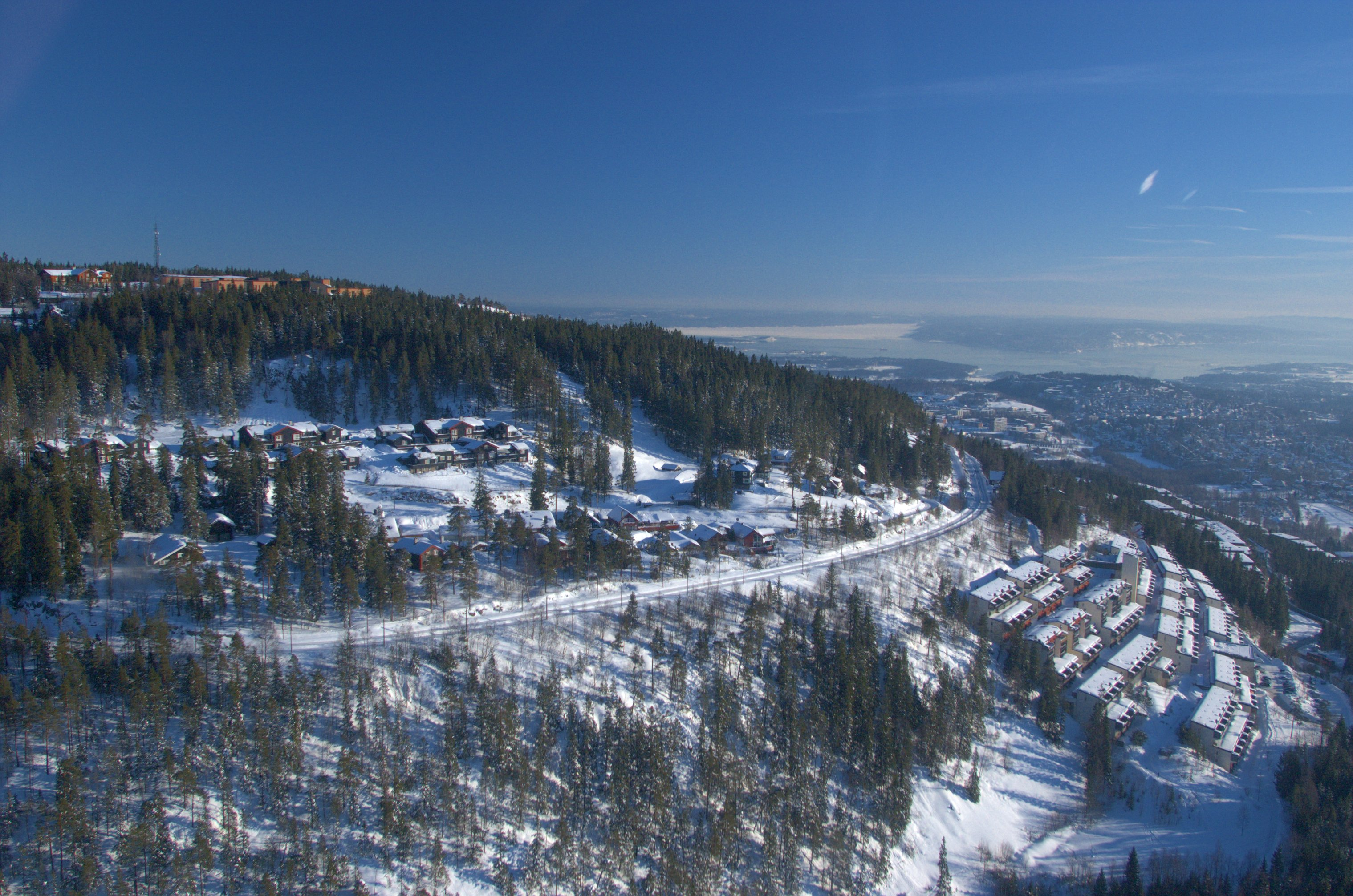 Voksenkollen, Oslo